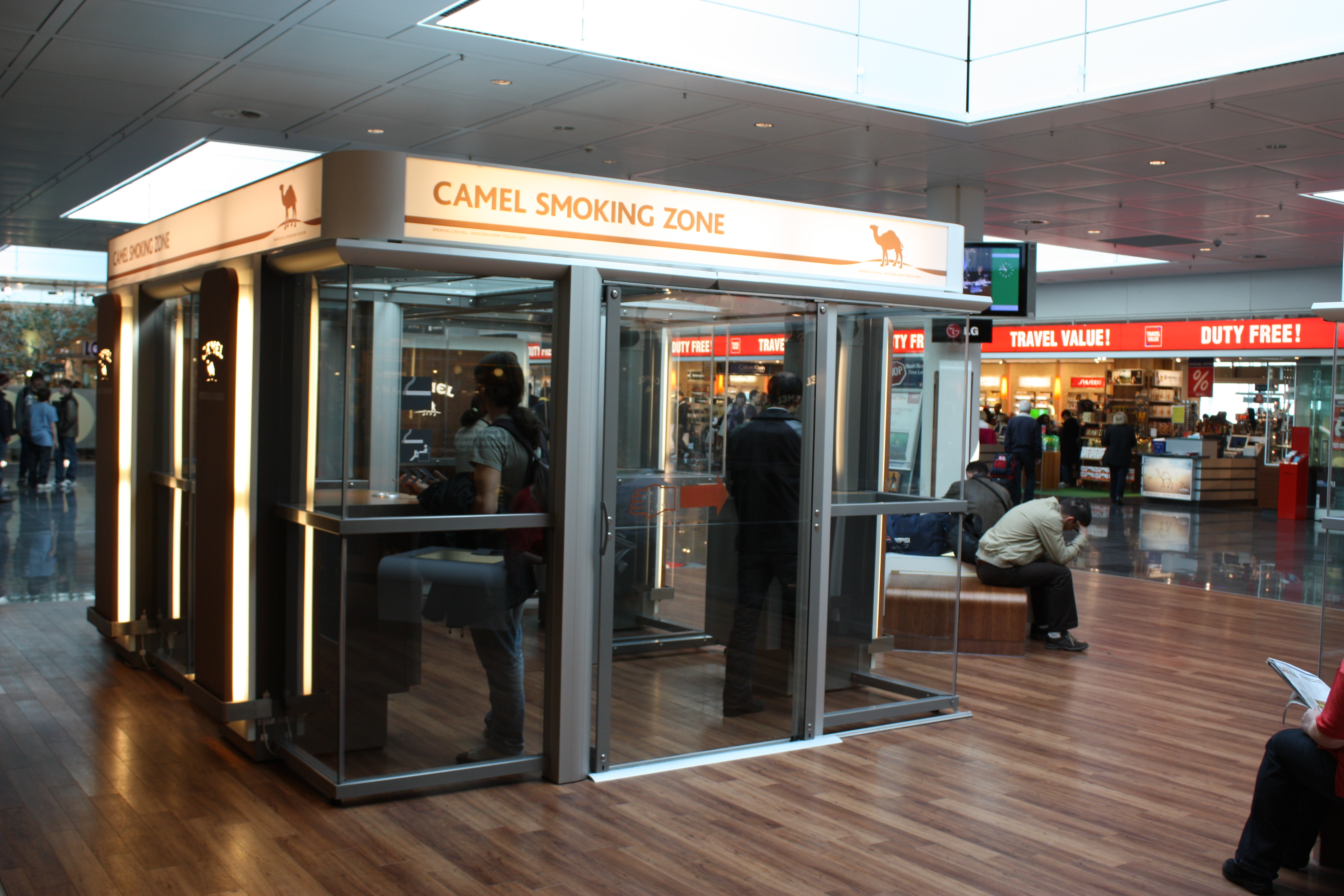 Airport Munich innen